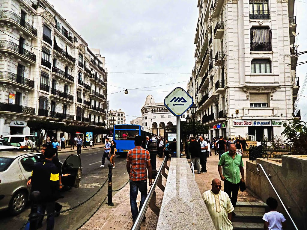 Bouche du métro d'Alger, Tafourah - Grande Poste